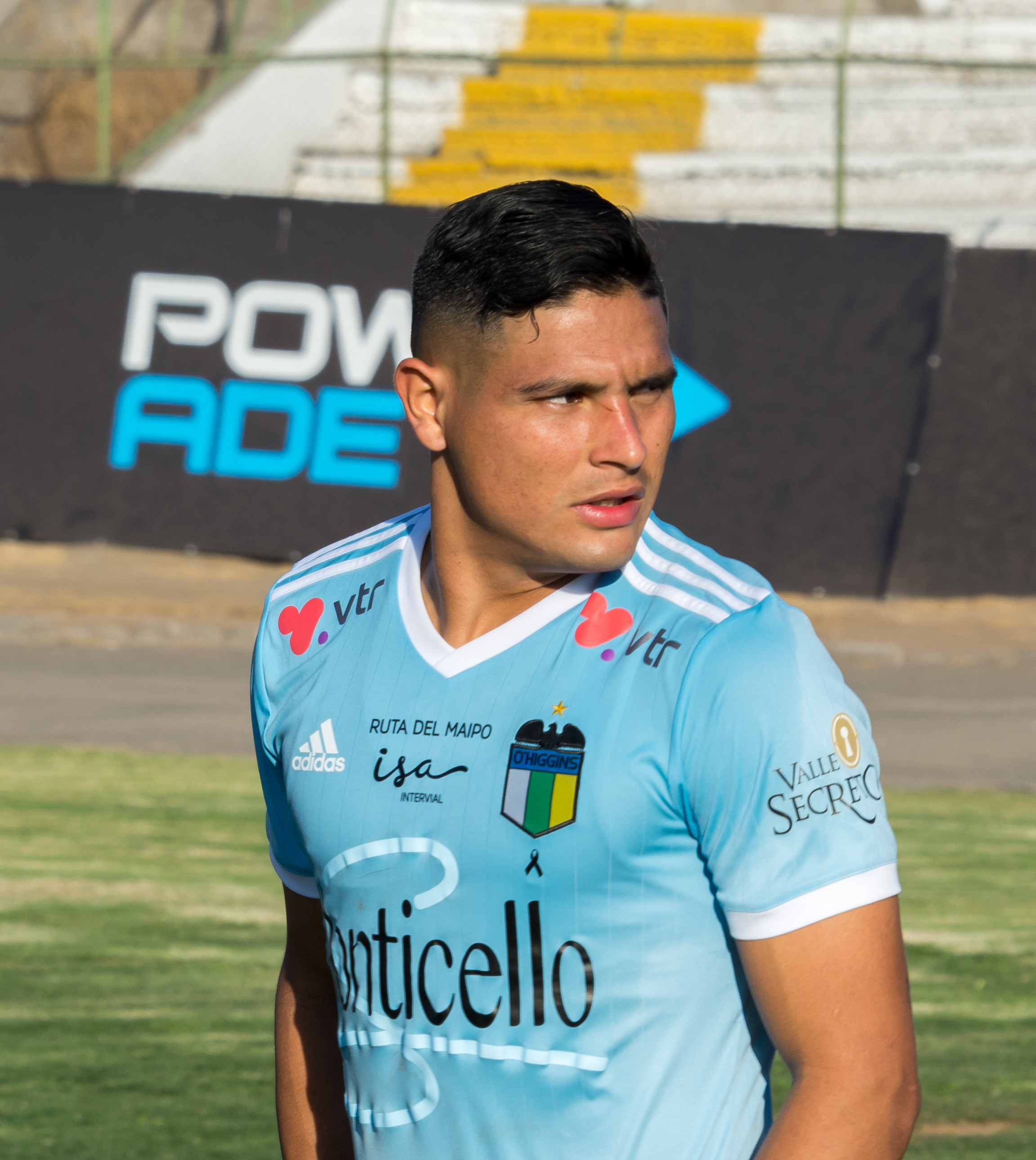 Maximiliano Salas, Palestino v O'Higgins, Estadio Municipal de La Cisterna, La Cisterna, Santiago, Chile.